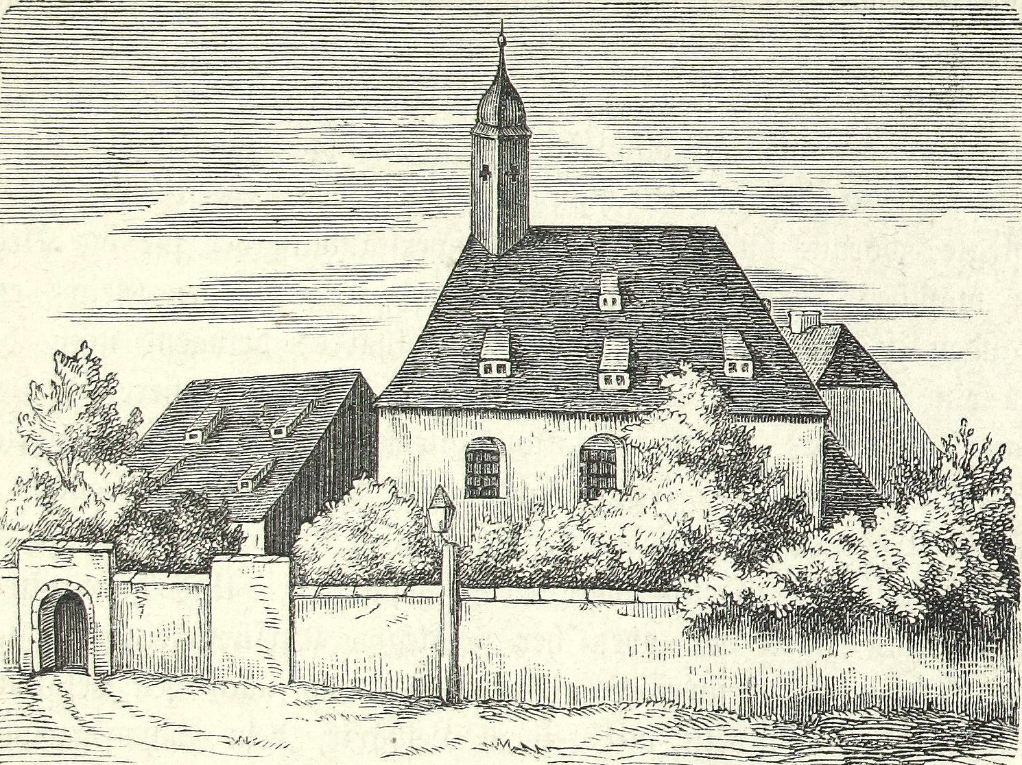 Stich der St.-Bartholomäus-Kirche mit angrenzendem Bartholomäus-Hospital in Dresden